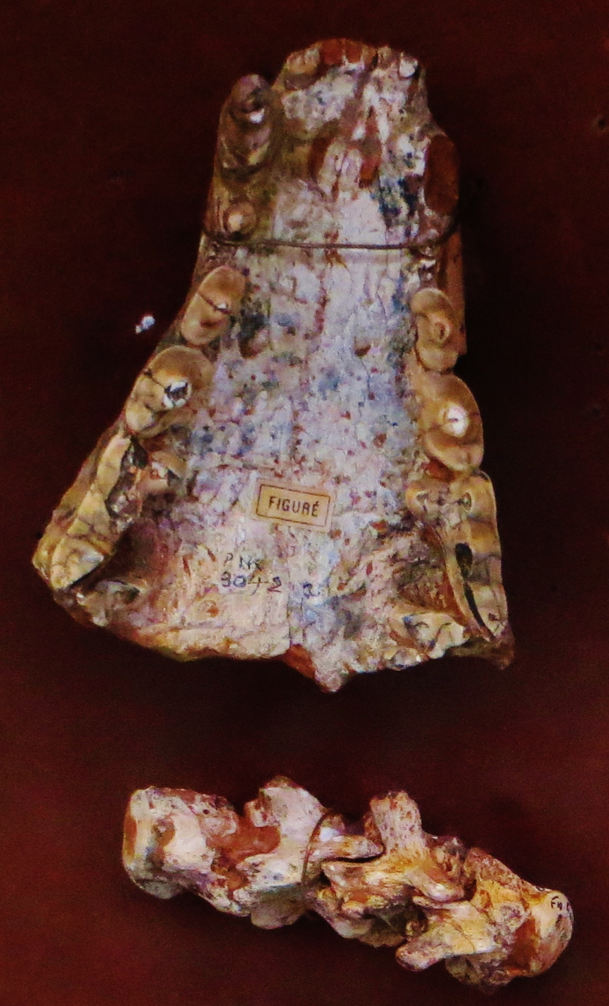 Fossil of Ictitherium, an extinct mammal- Took the photo at Musee d'Histoire Naturelle, Paris